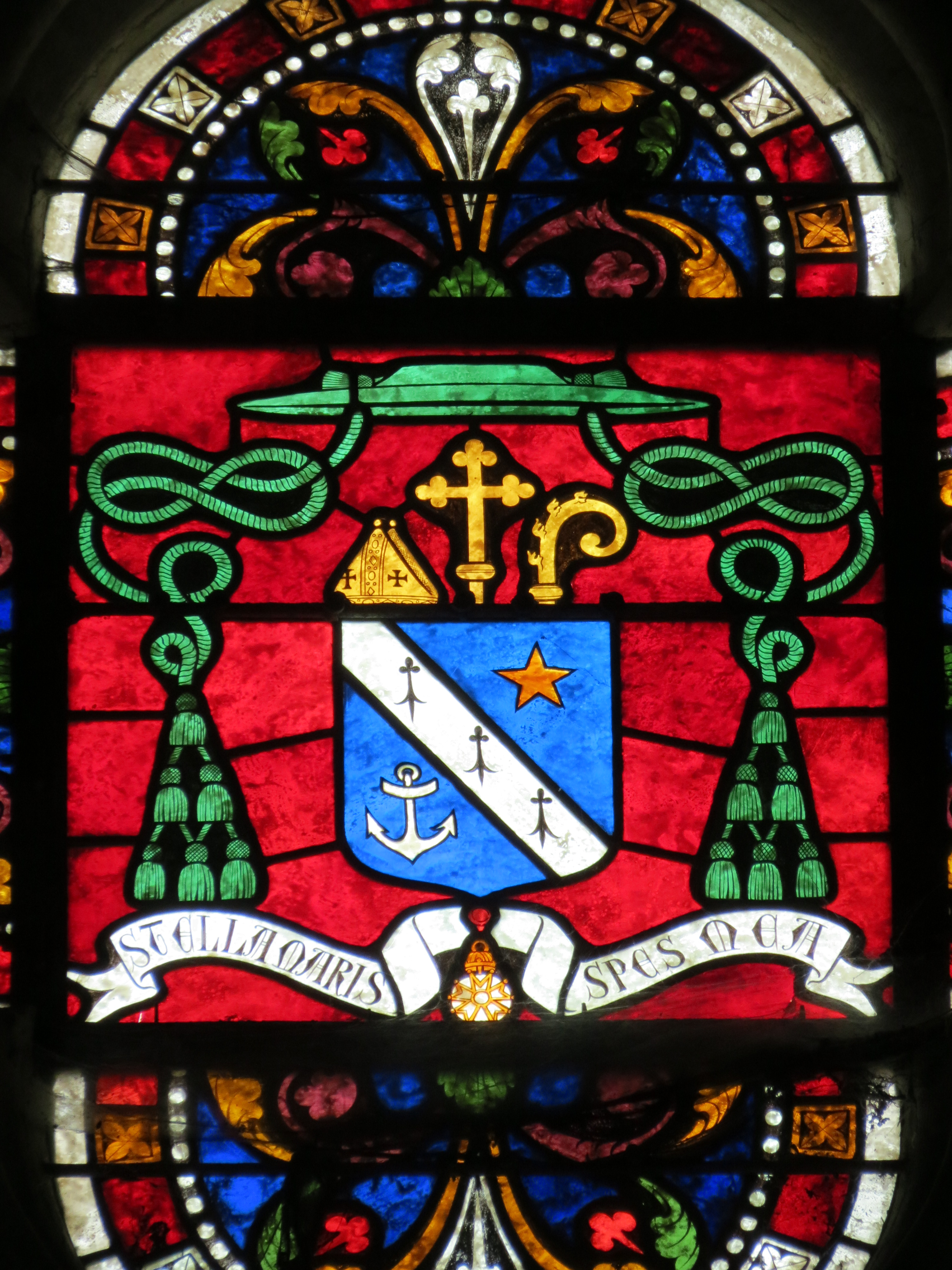 Blason de l'évêque Trégaro dans la chapelloe du Saint-Sacrement (axiale) de la cathédrale de Sées.